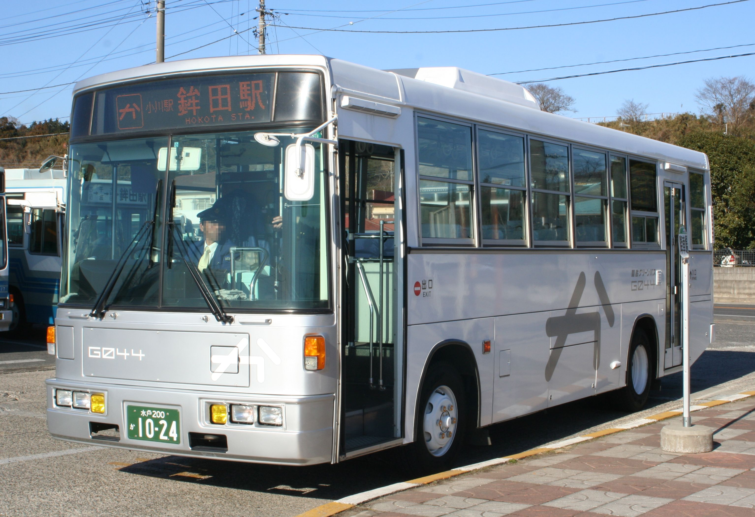 関鉄グリーンバスの車両（かしてつ塗色）